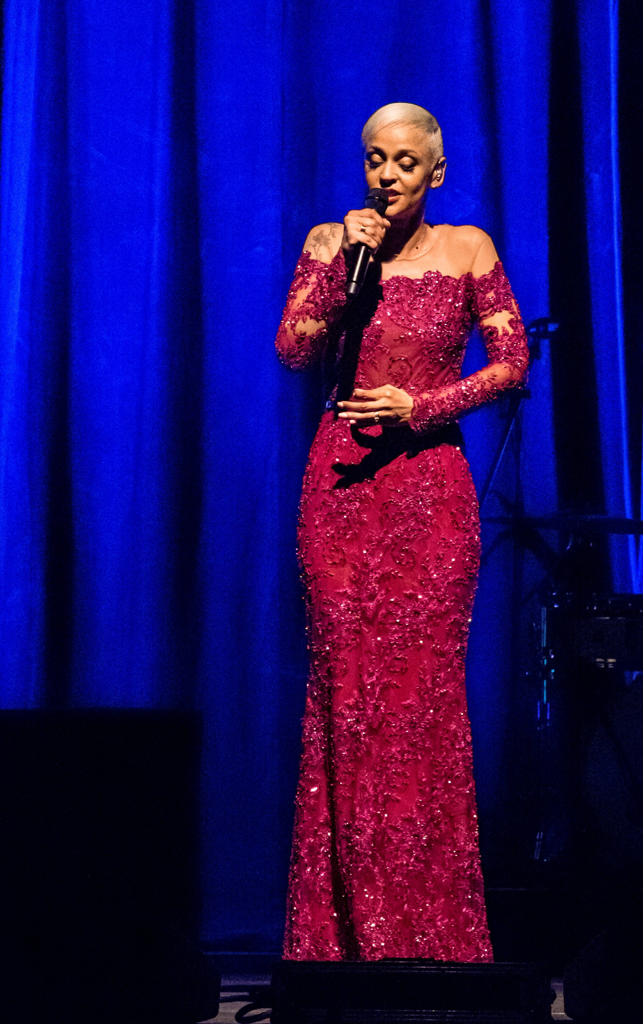 Bilder vom ZMF 2015 Mariza